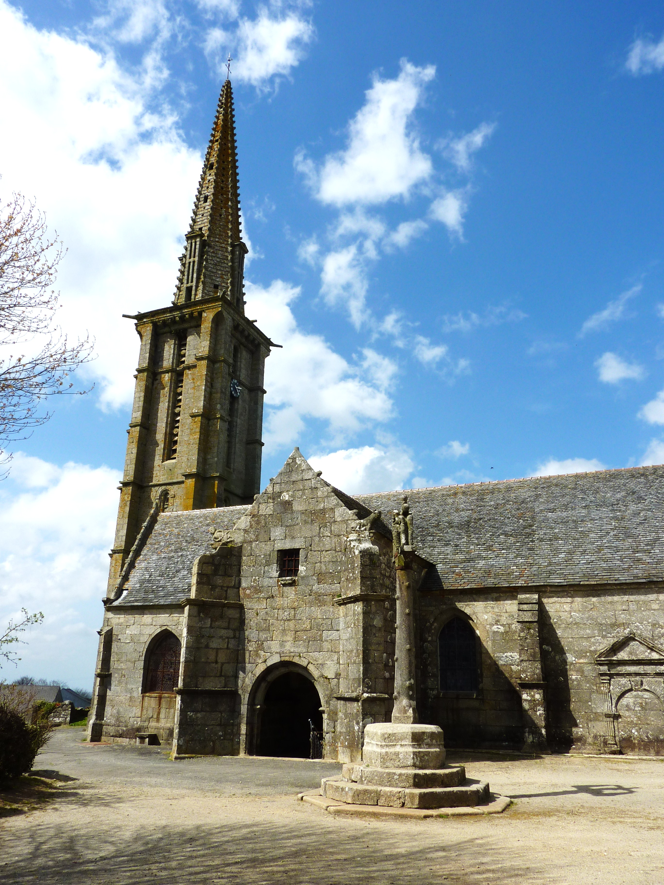 Eglise paroissiale Saint-Yves de Plounéour-Menez 1